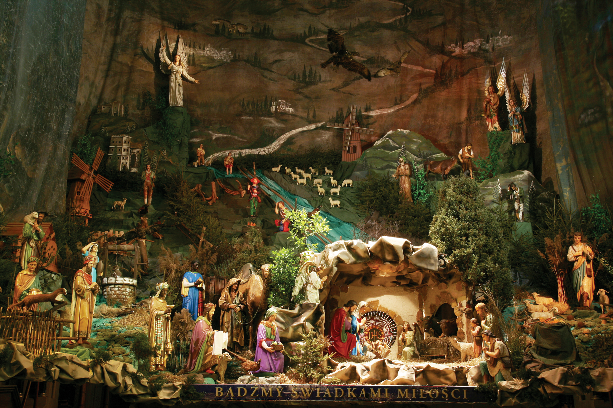 Crib in Katowice Panewniki, Poland (2009)